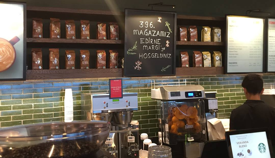 SBUX açılış